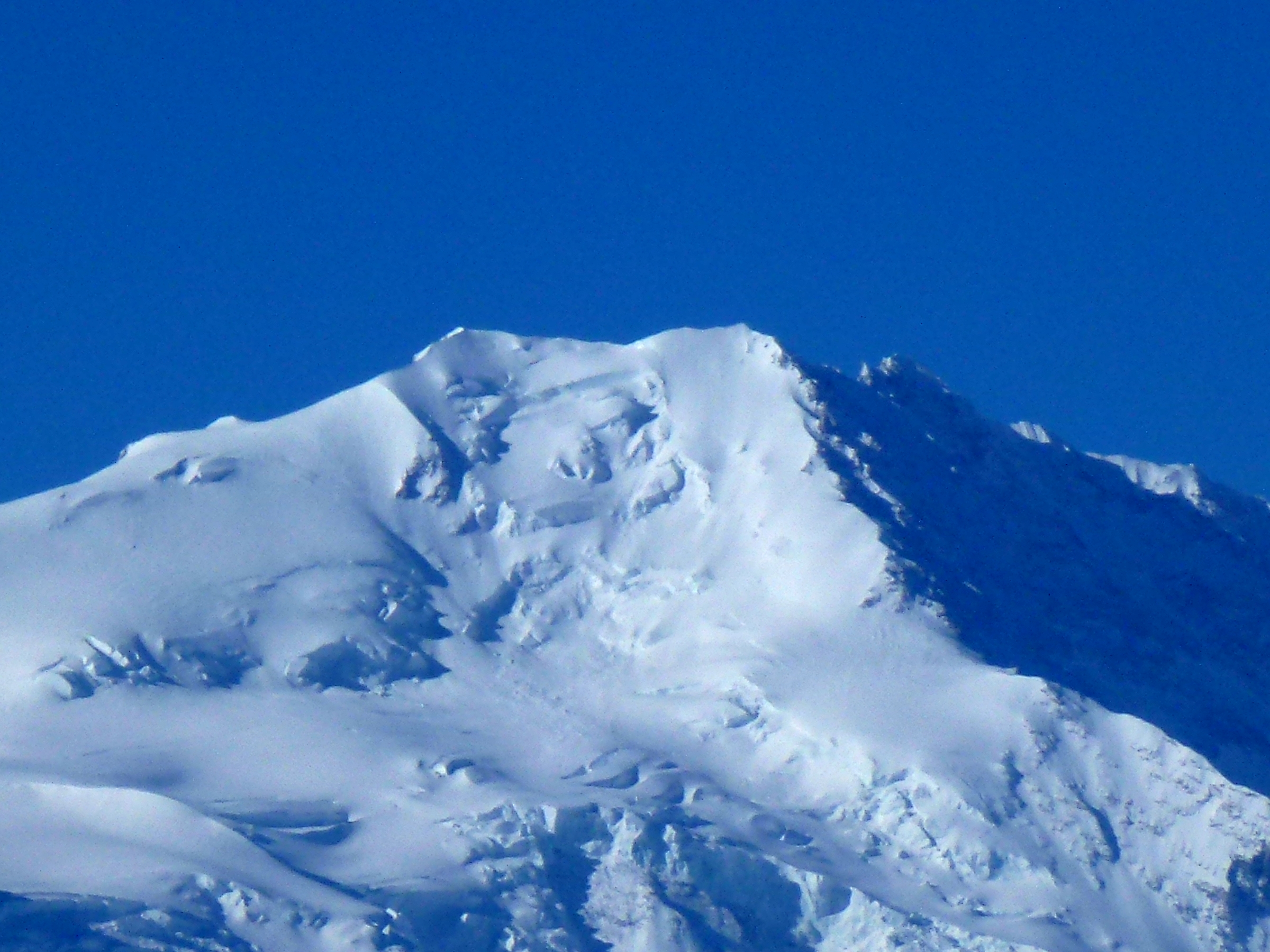 8,013m Shishapangma Tibet China 西藏 希夏邦马峰